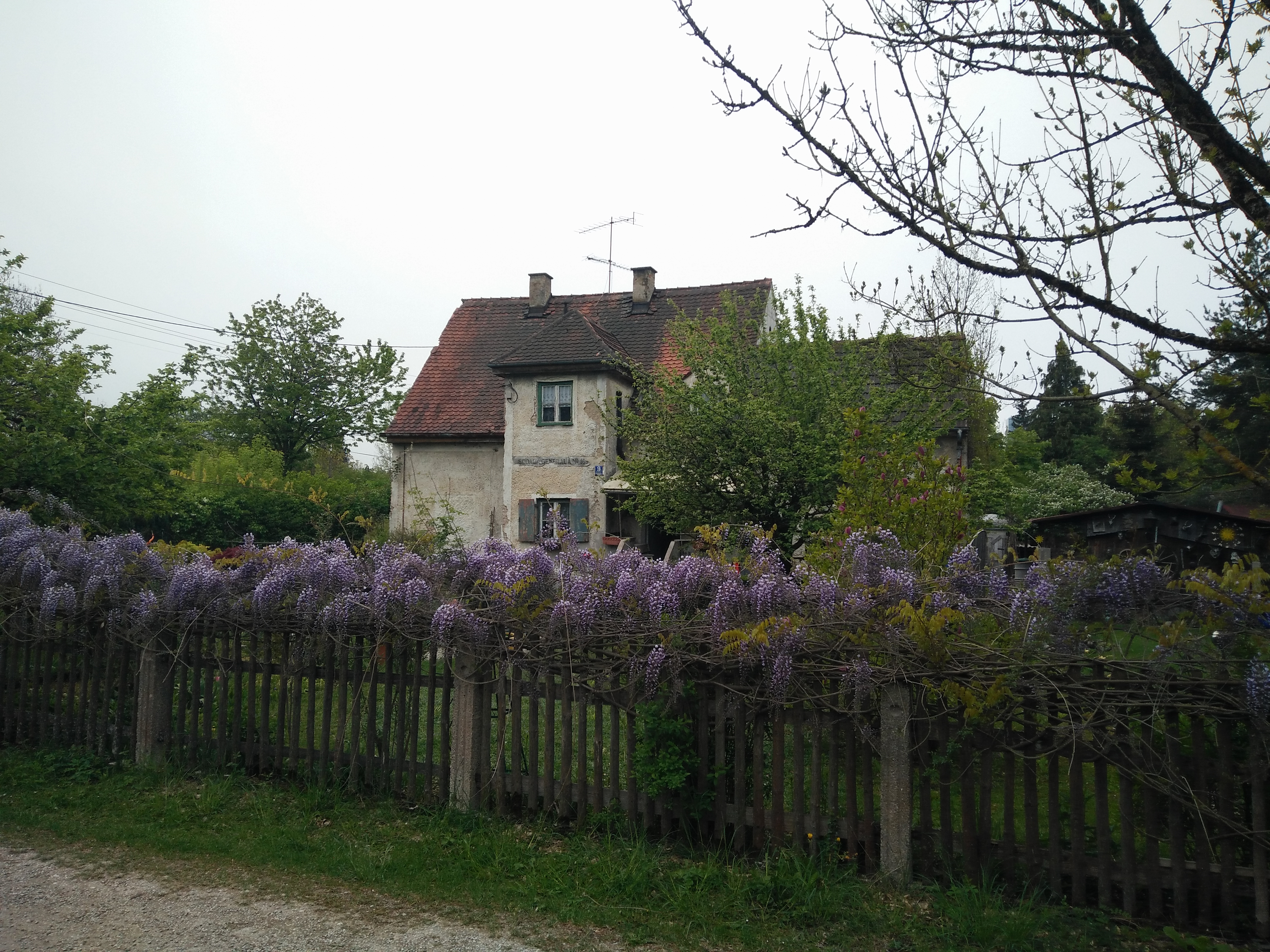 Eggarten Scoala Generala front